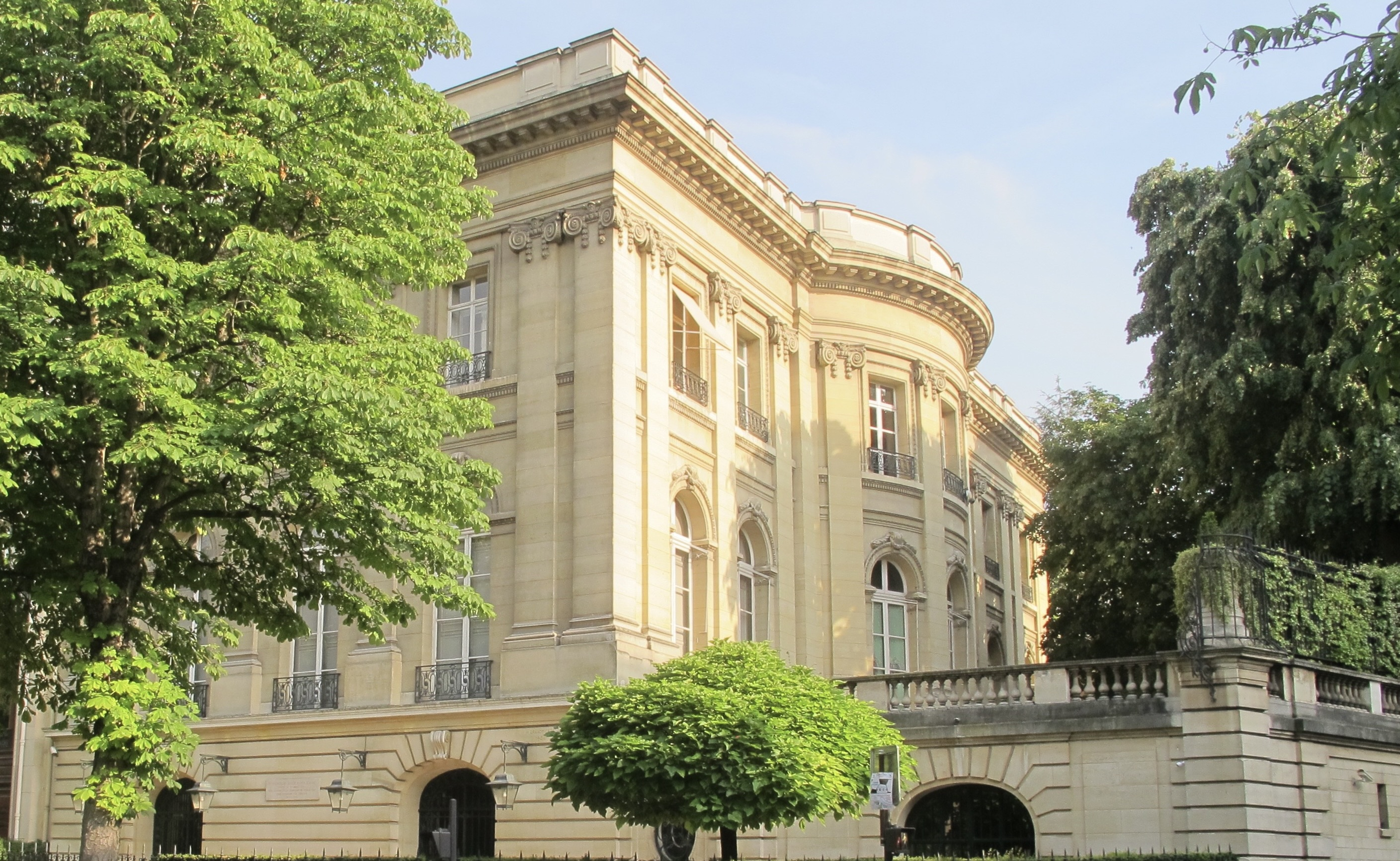 Siège de la fondation Singer-Polignac, au n°43 avenue Georges-Mandel (Paris, 16e).